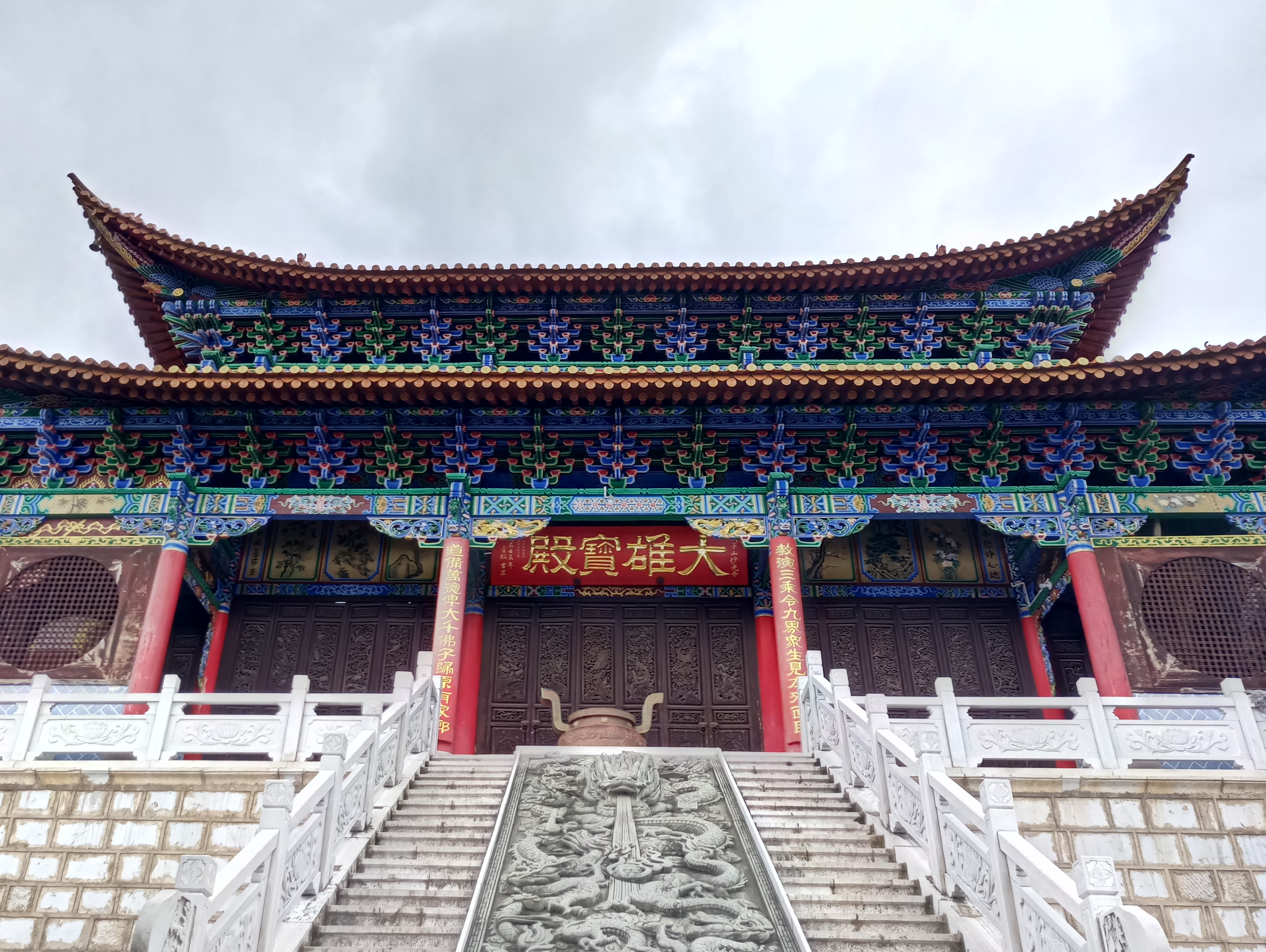 中文（中国大陆）: 石林县狮山寺大雄宝殿